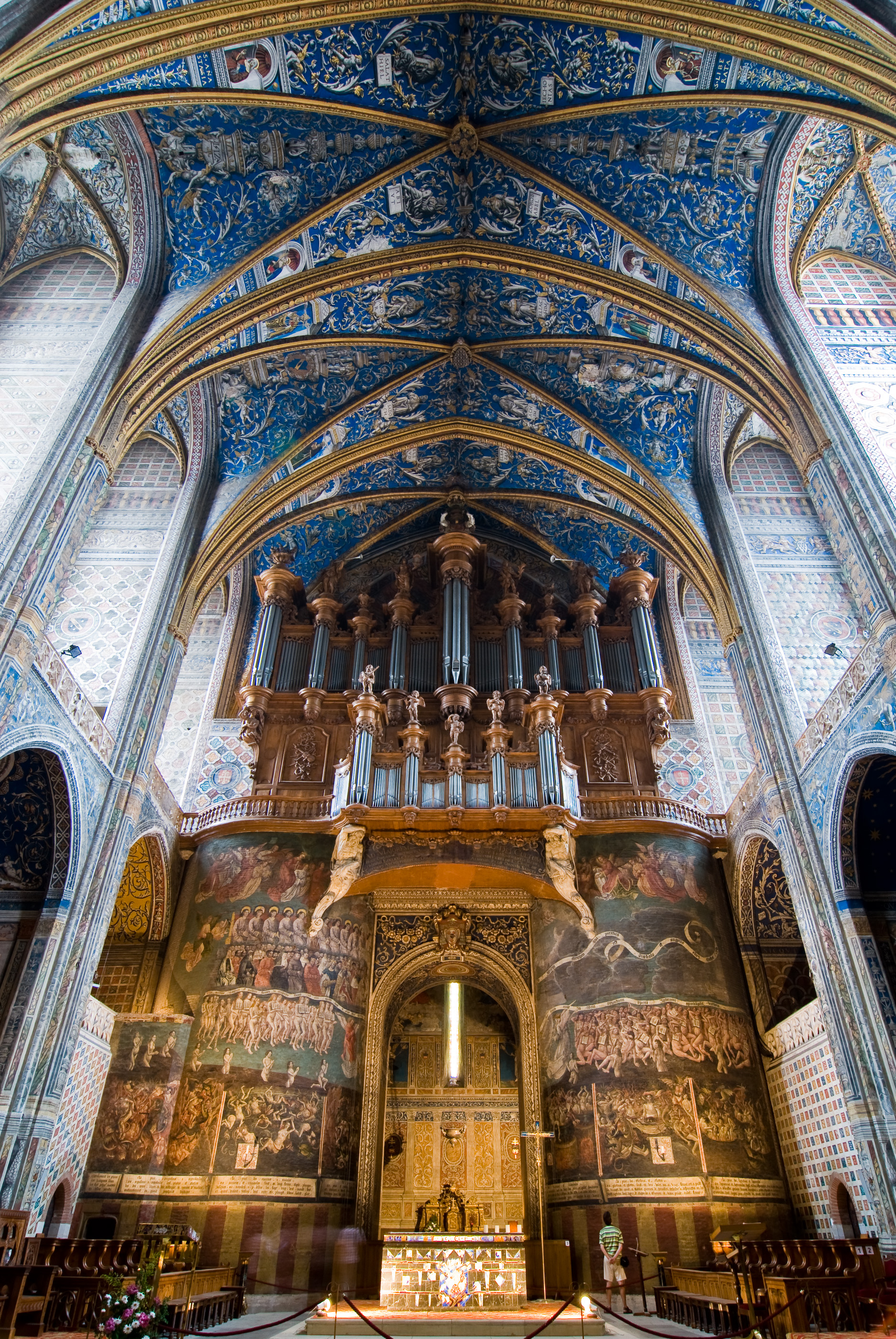 Buffet d'orgues (Cathédrale Sainte-Cécile, Albi)